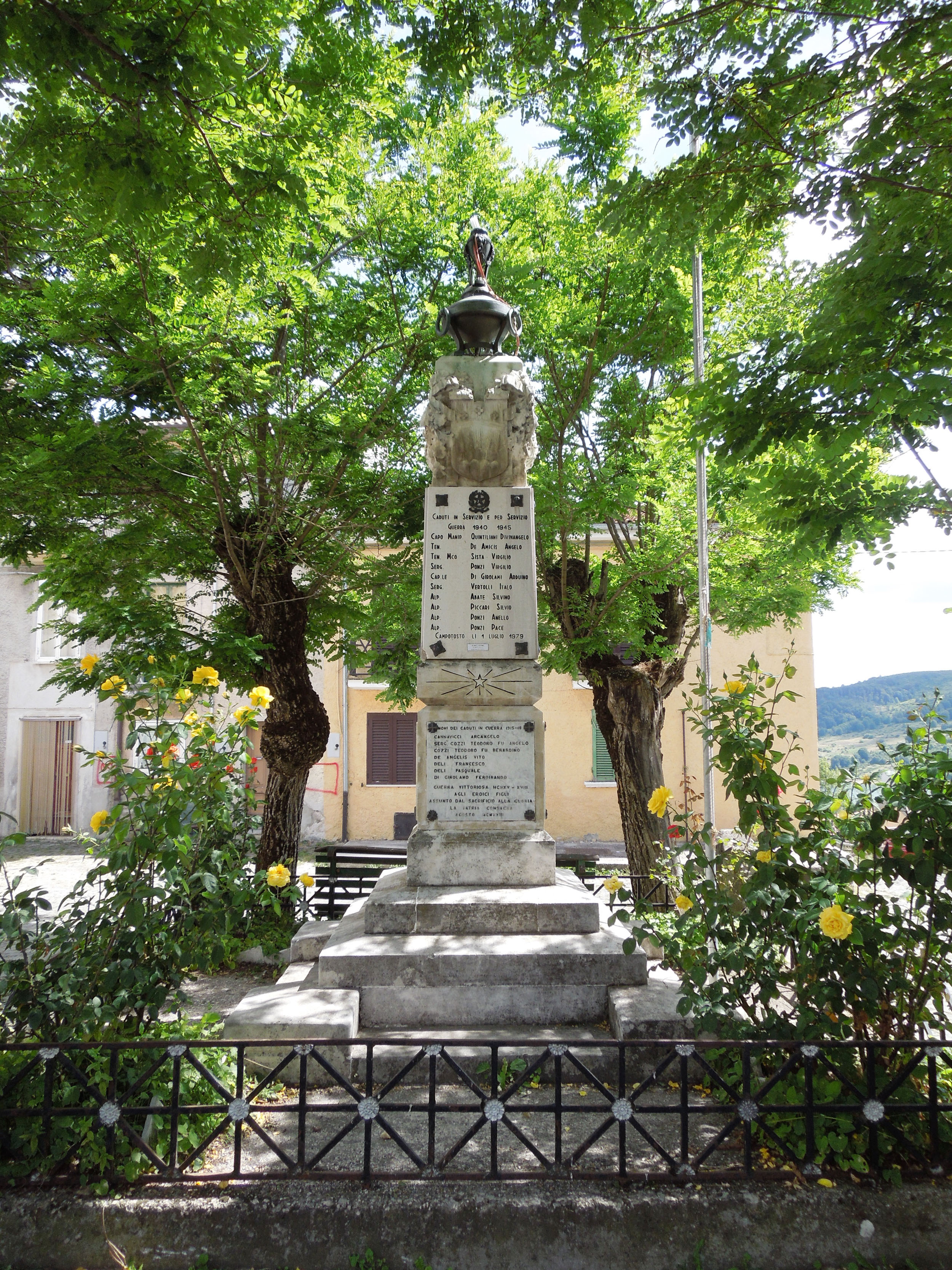 Monumento ai Caduti di Campotosto in provincia dell'Aquila. Immagine scattata a luglio 2016.